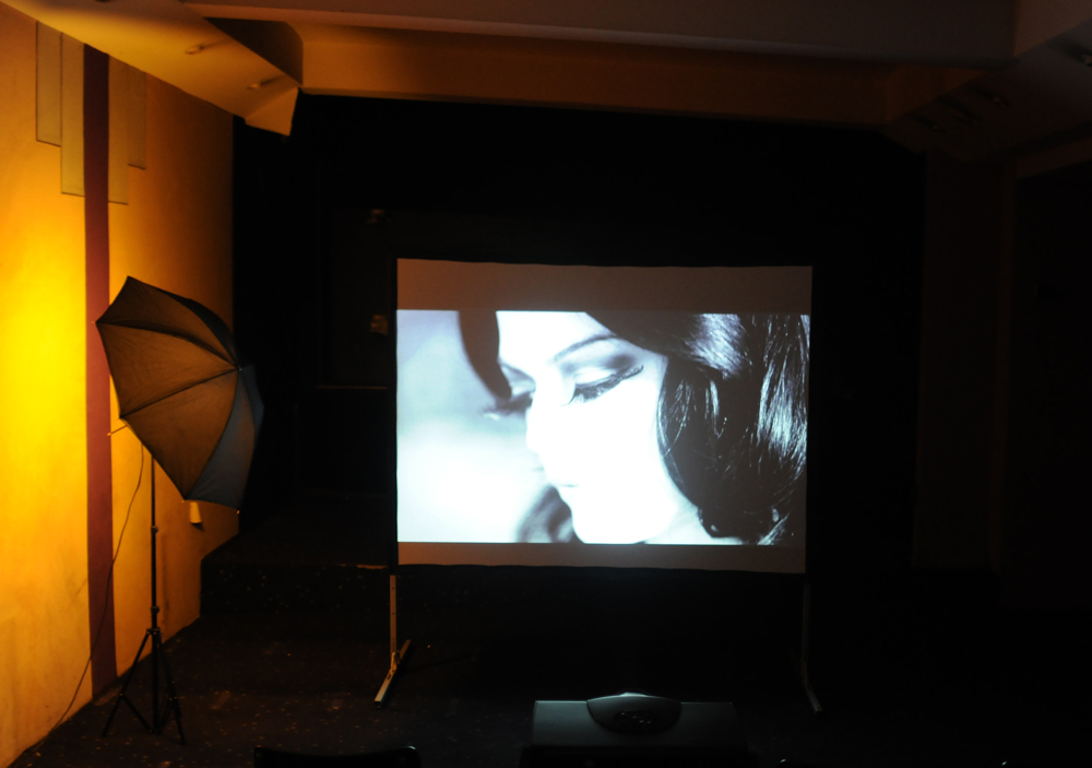 Gewinner Art Award 2012